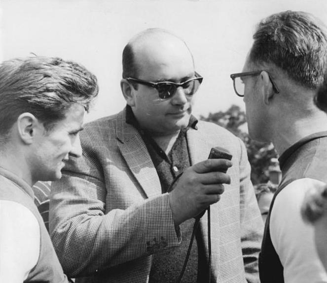 Zentralbild Wendorf 17.8.1961 Die XII. Internationale DDR-Rad-Rundfahrt wurde am 17.8.1961 vor dem Klubhaus der Jugend und Sportler gestartet. Die erste Etappe führt über 180 km nach Forst. UBz: Rundfunkreporter Oertel (Mitte) mit Bernhard Eckstein (links) und Täve Schur. Beide Sportler erklärten zu dem Abbruch des gesamtdeutschen Sportverkehrs durch Bonn: Dieser befohlene Abbruch der sportlichen Beziehungen mit der DDR ist eine Unverschämtheit und bestimmt nicht im Sinne der westdeutschen Aktiven.